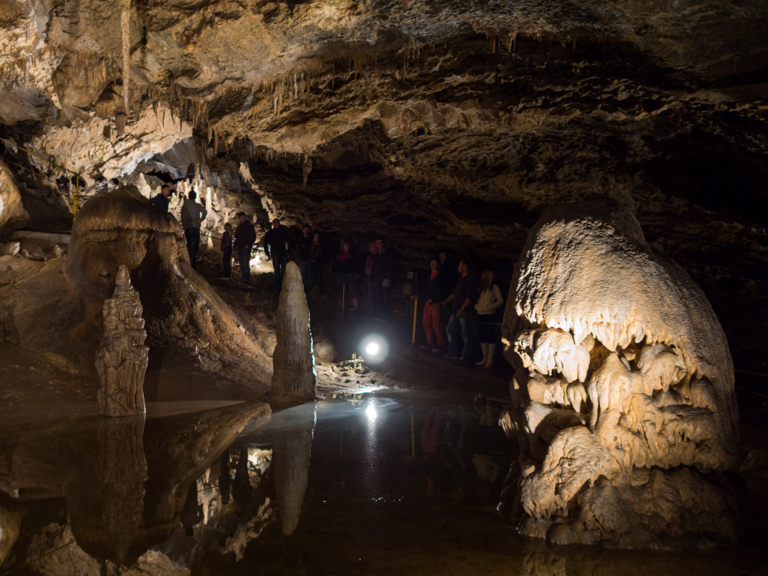 Sala Palmowa w Jaskini BielskiejSlovenčina: Palmová sieň v Belianskej jaskyni